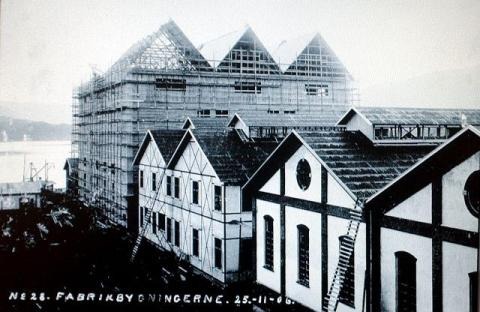 Фабрика по производству минеральных удобрений в Нутоддене, Телемарк